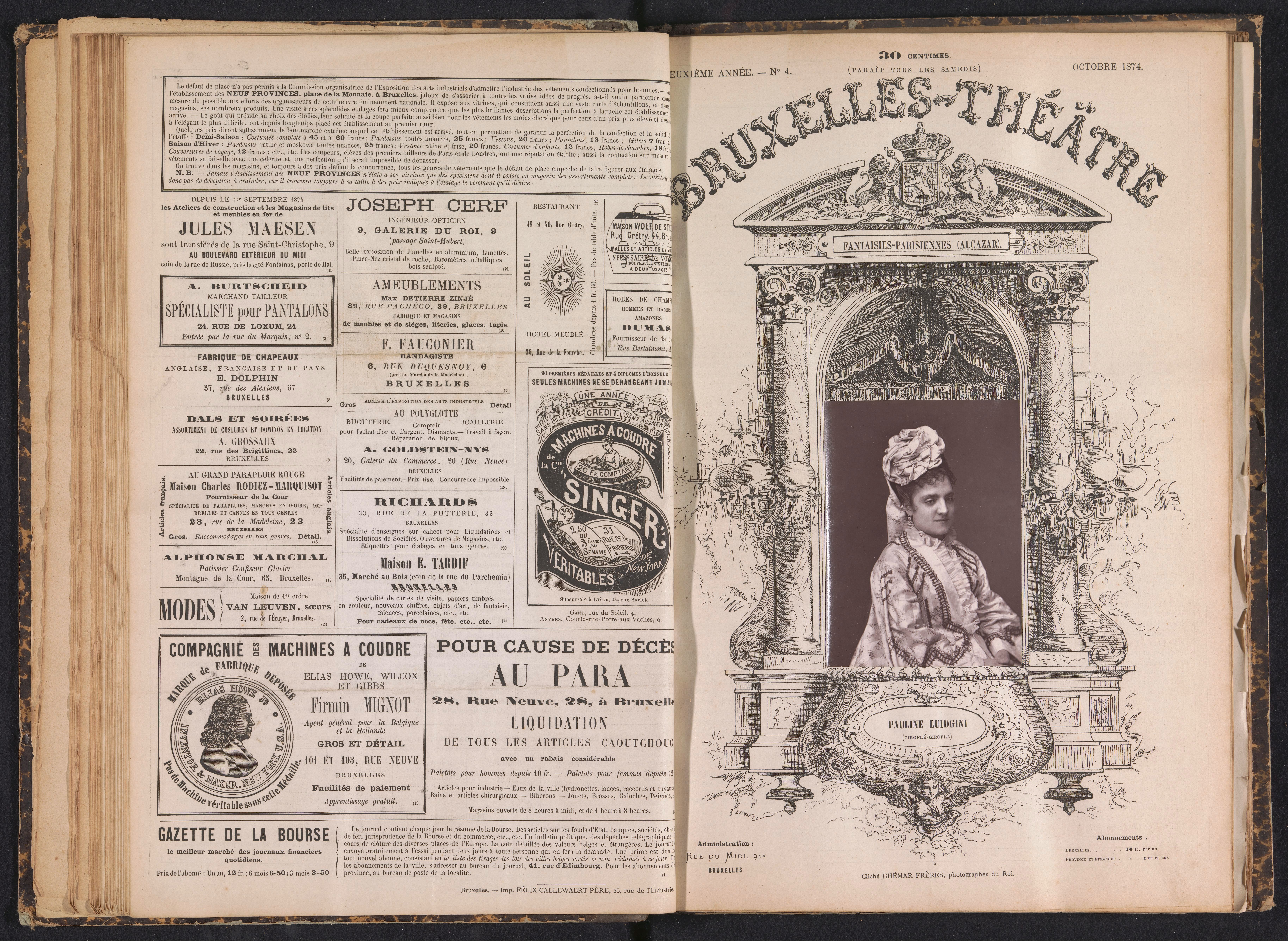 IdentificatieTitel(s): Portret van Pauline Luigini in Giroflé-GiroflaPauline Luidgini (Giroflé-Girofla) (titel op object)Objecttype: fotomechanische afdruk bladzijde Objectnummer: RP-F-2001-7-1467A-21Opschriften / Merken: nummer, recto, gedrukt: ‘No 4.’VervaardigingVervaardiger: fotograaf: Ghémar Frères (vermeld op object)clichémaker: anoniemPlaats vervaardiging: BrusselDatering: ca. 1869 - in of voor 1874Materiaal: papier Techniek: WoodburytypieAfmetingen: prent: h 115 mm × b 86 mmOnderwerpWat: portrait of opera-singerWie: Pauline LuiginiVerwerving en rechtenCredit line: Aankoop met steun van de Mondriaan Stichting, het Prins Bernhard Cultuurfonds, het VSBfonds, het Paul Huf Fonds/Rijksmuseum Fonds en het Egbert KunstfondsVerwerving: aankoop 2001Copyright: Publiek domein